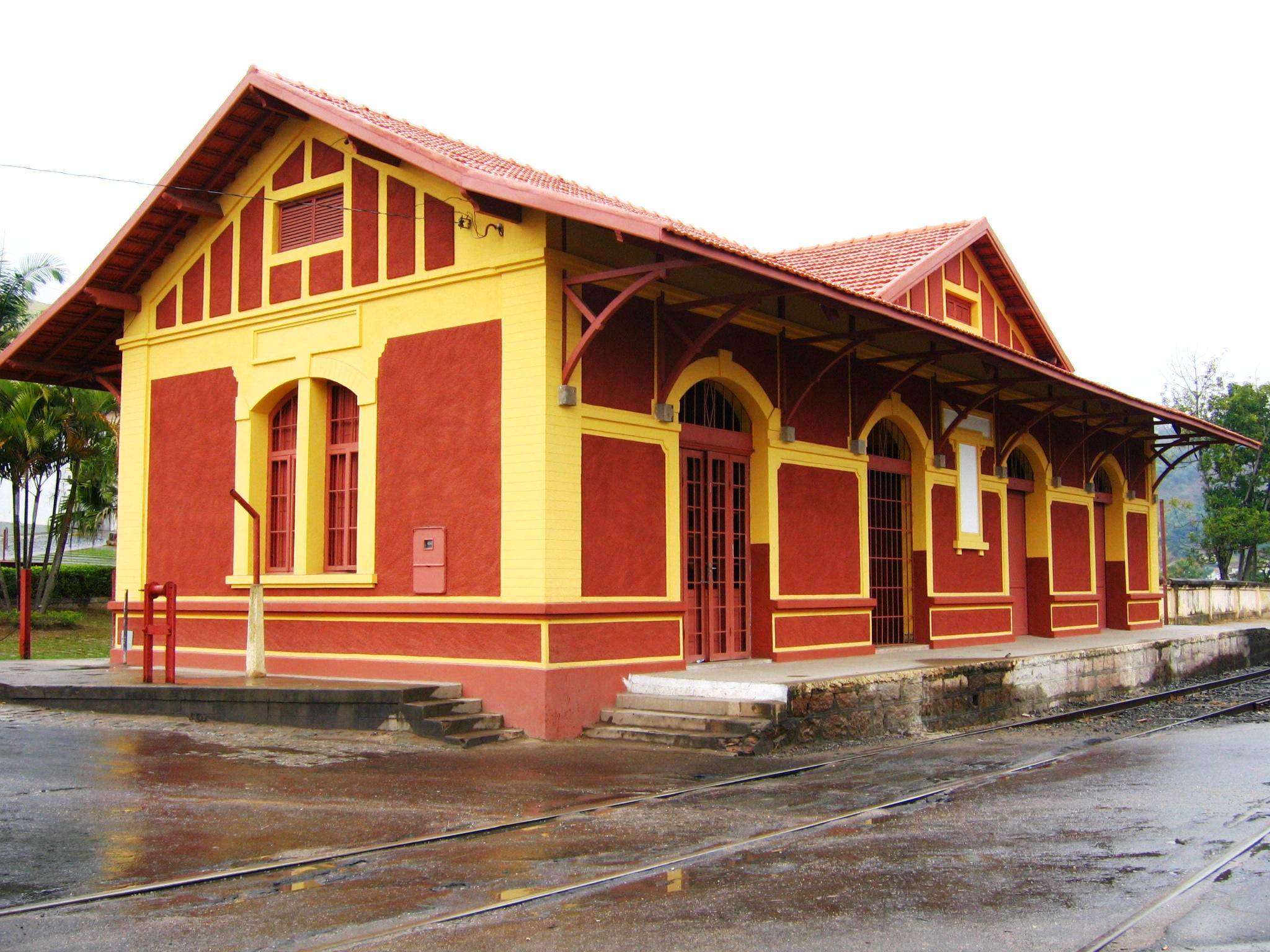 Estação ferroviária de Guararema